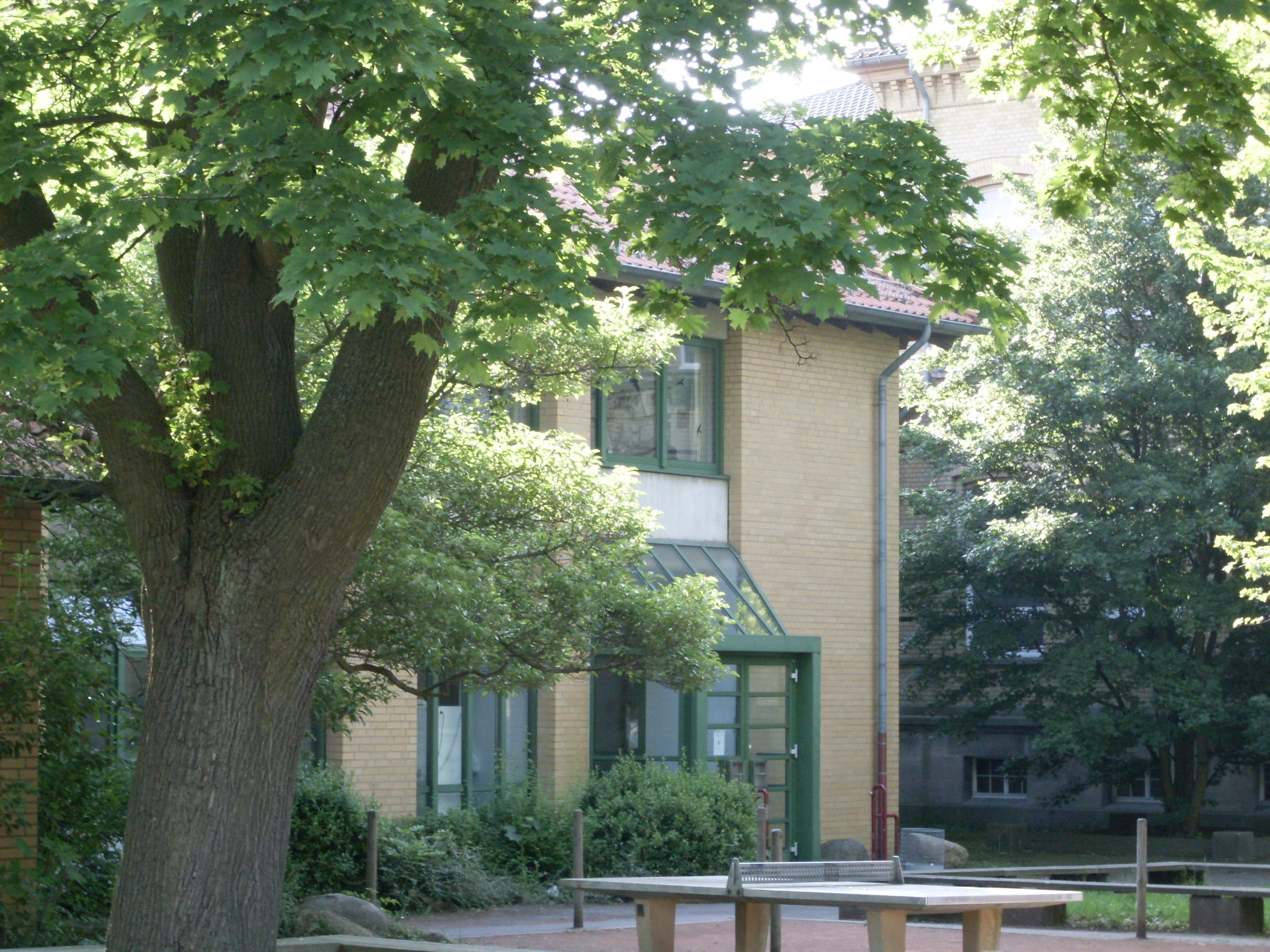 Frontansicht der Großen Schule Wolfenbüttel